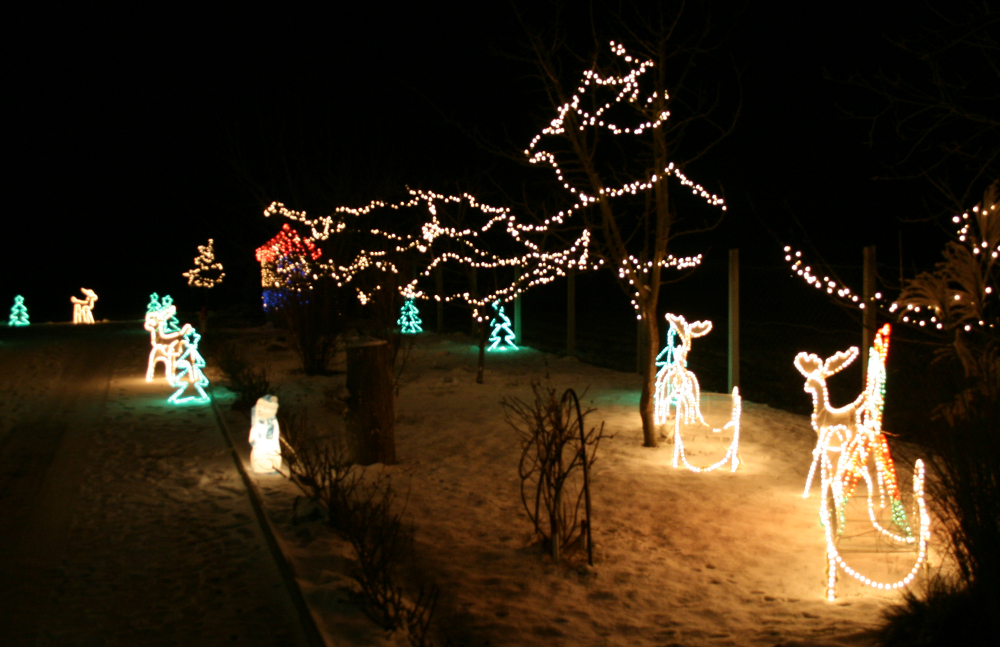 Božićni ukrasi siječanj 2009 Bojnikovec